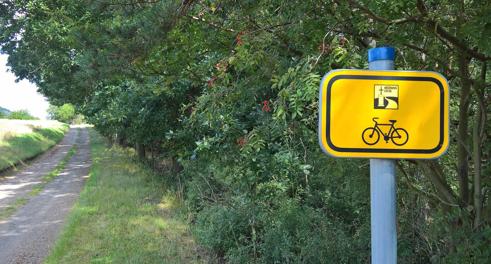 Křížková cesta značení